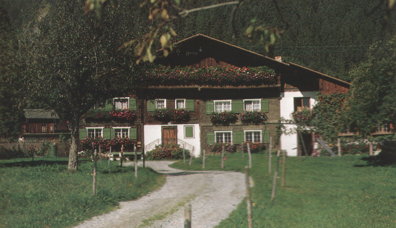 Montafonerhaus